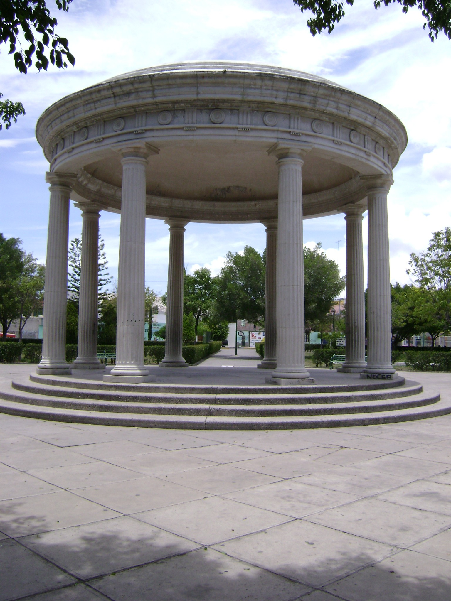 Monumento de estilo romando en el parque "La Arcadia" en la ciudad de Tehuacán, estado de Puebla, México